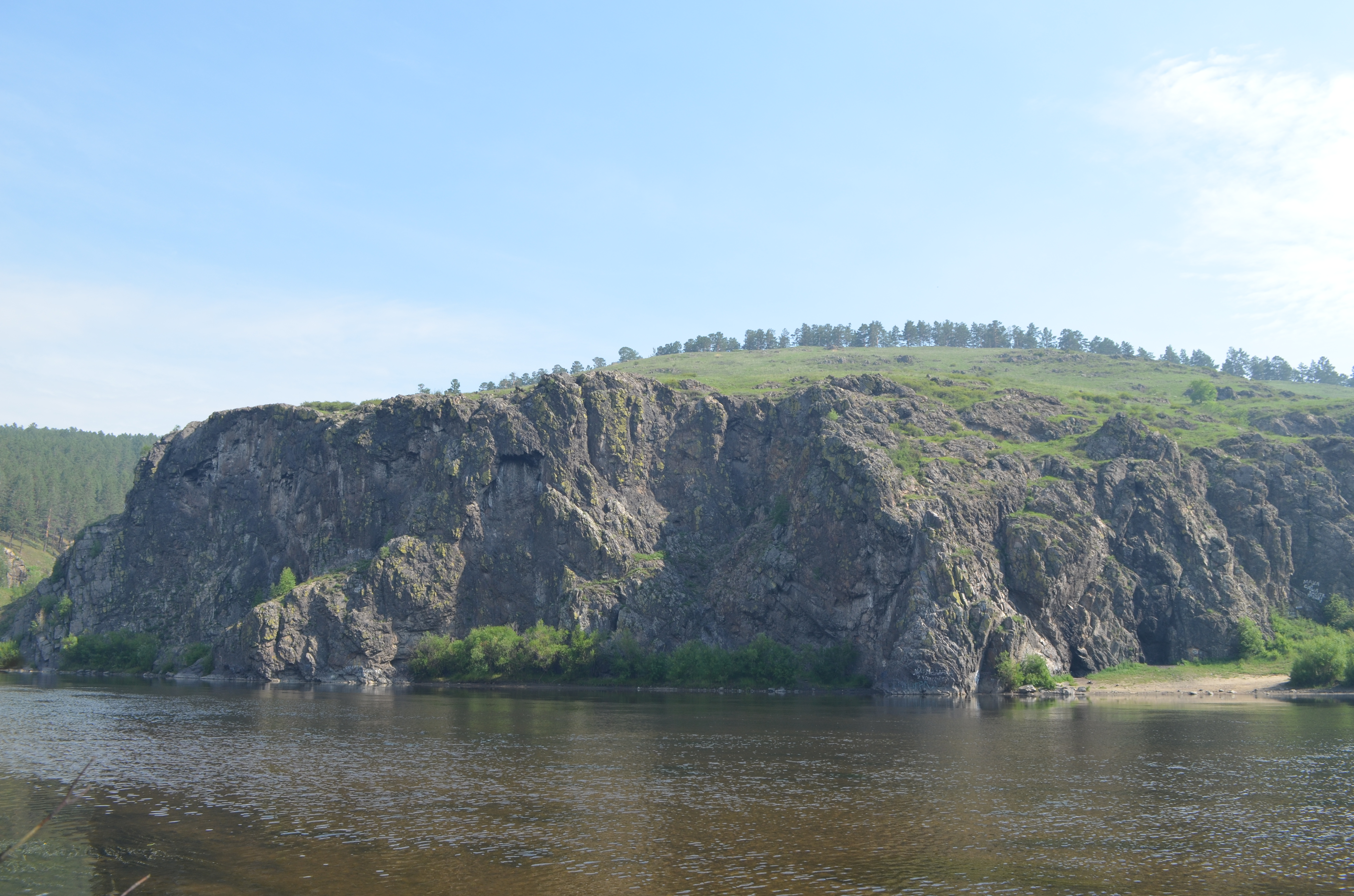 снимки конца июня - начала июля 2015 г.